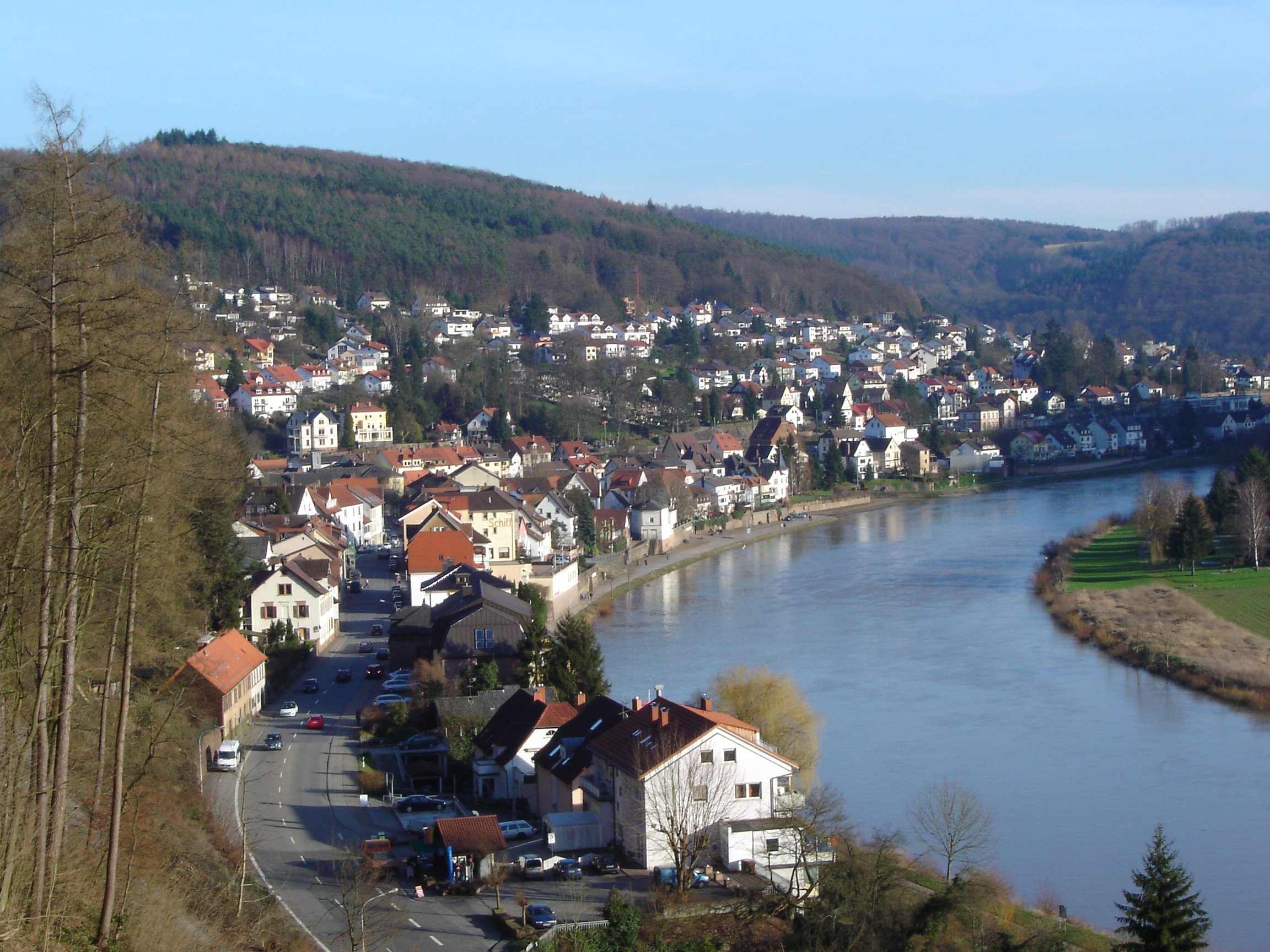 Neckarsteinach von der Hinterburg gesehen